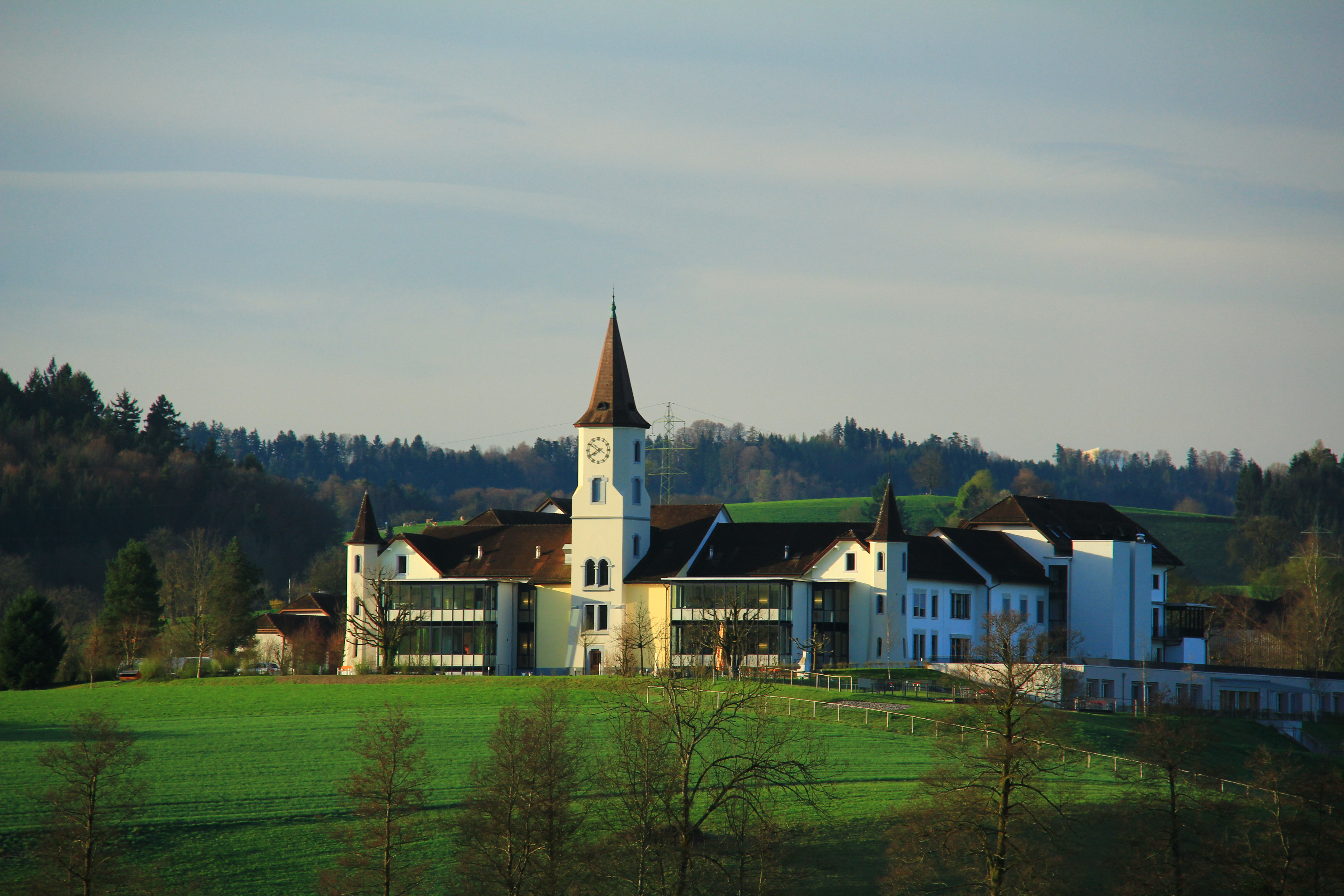 Pflegeheim Sennhof vom Leidenberg aus